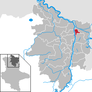 Sandau (Elbe) im Landkreis Stendal, Sachsen-Anhalt